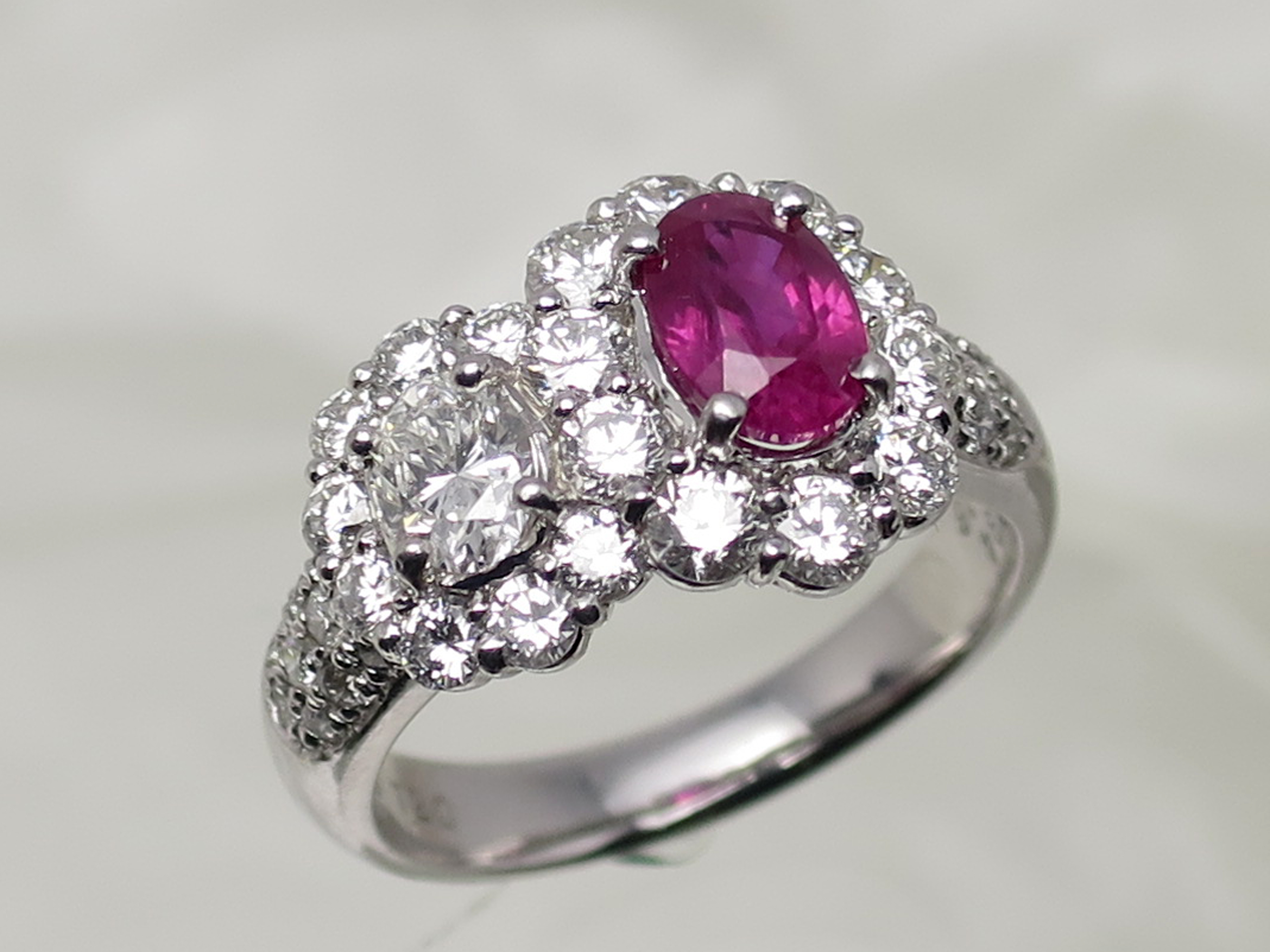 ルビーの指輪